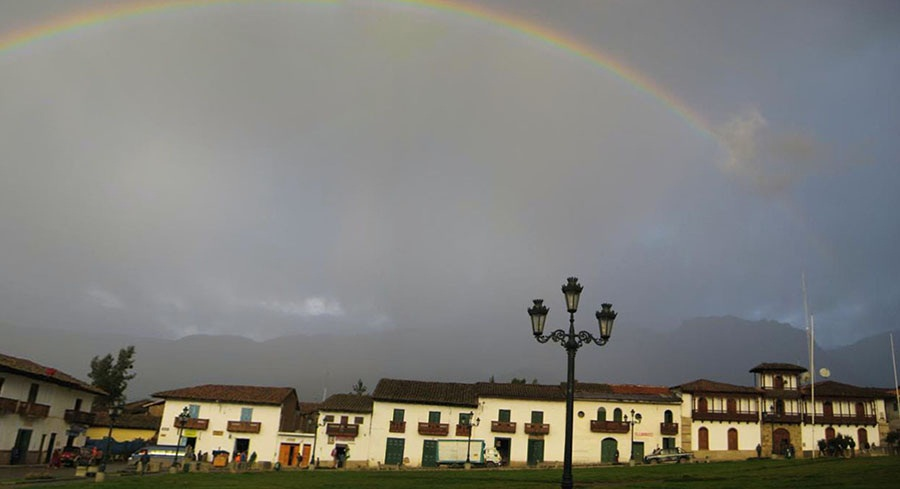 Frente cálido con lluvias procedente de Huakuy.